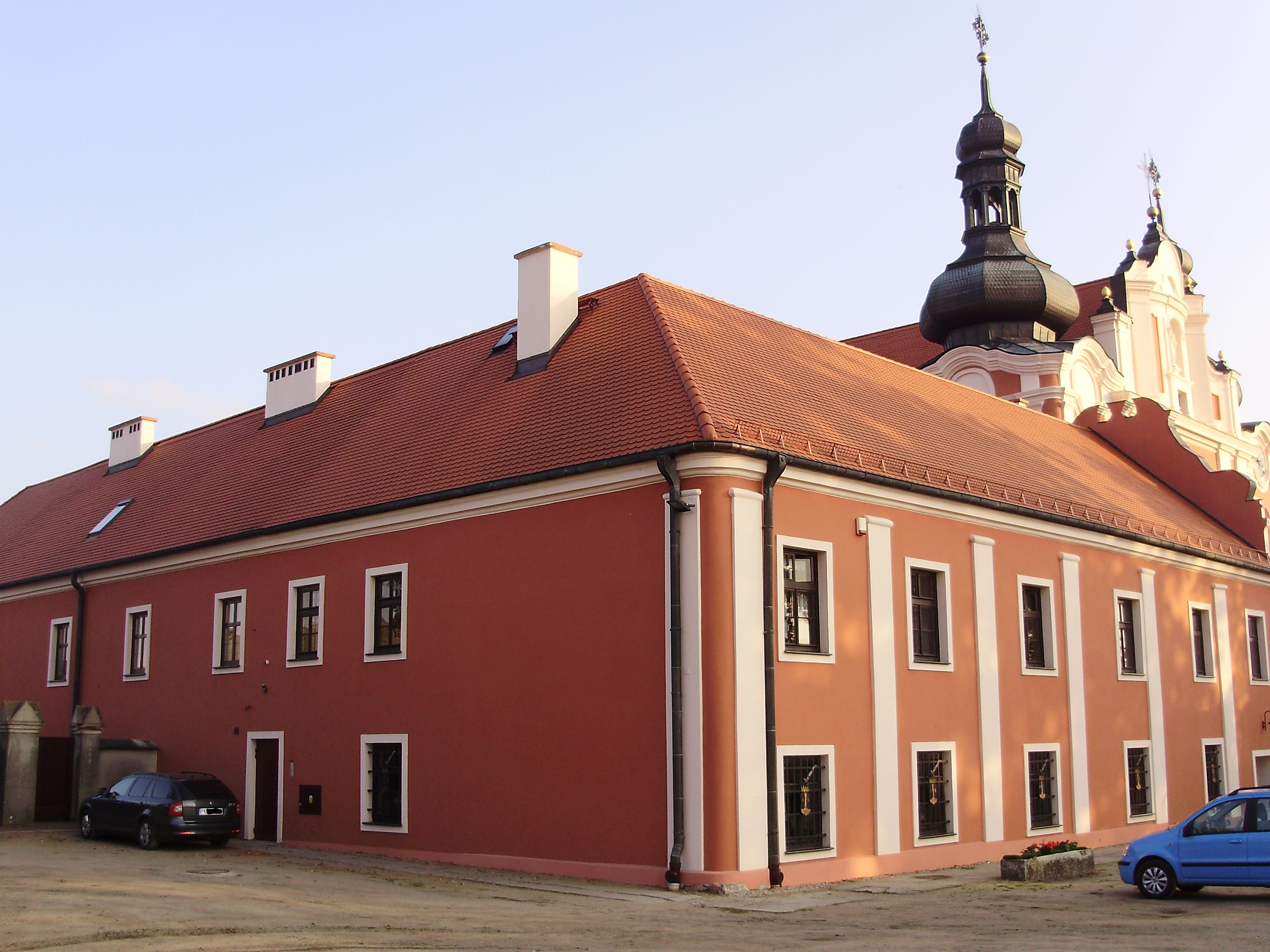 Kłodawa, klasztor, ob. plebania, 1 poł. XVIII